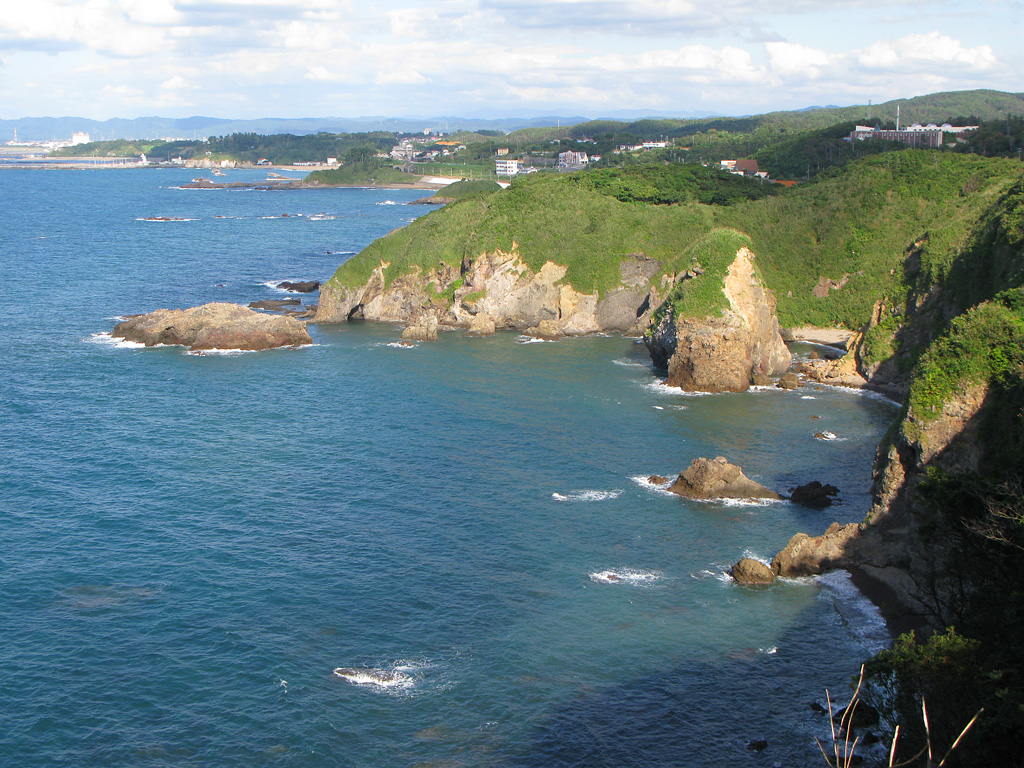 遊歩道より